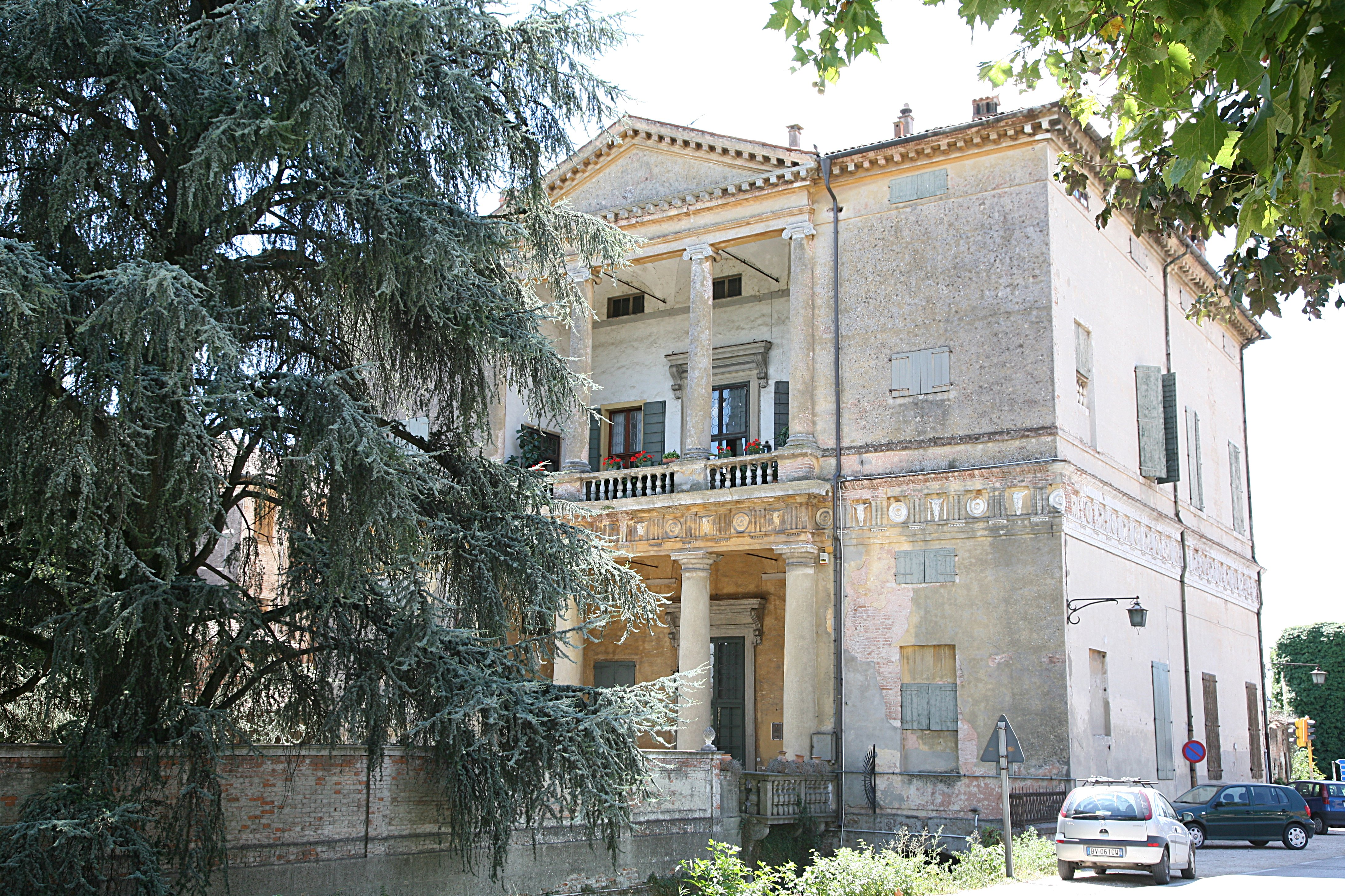 Villa Pisani in Montagnana by Andrea Palladio.